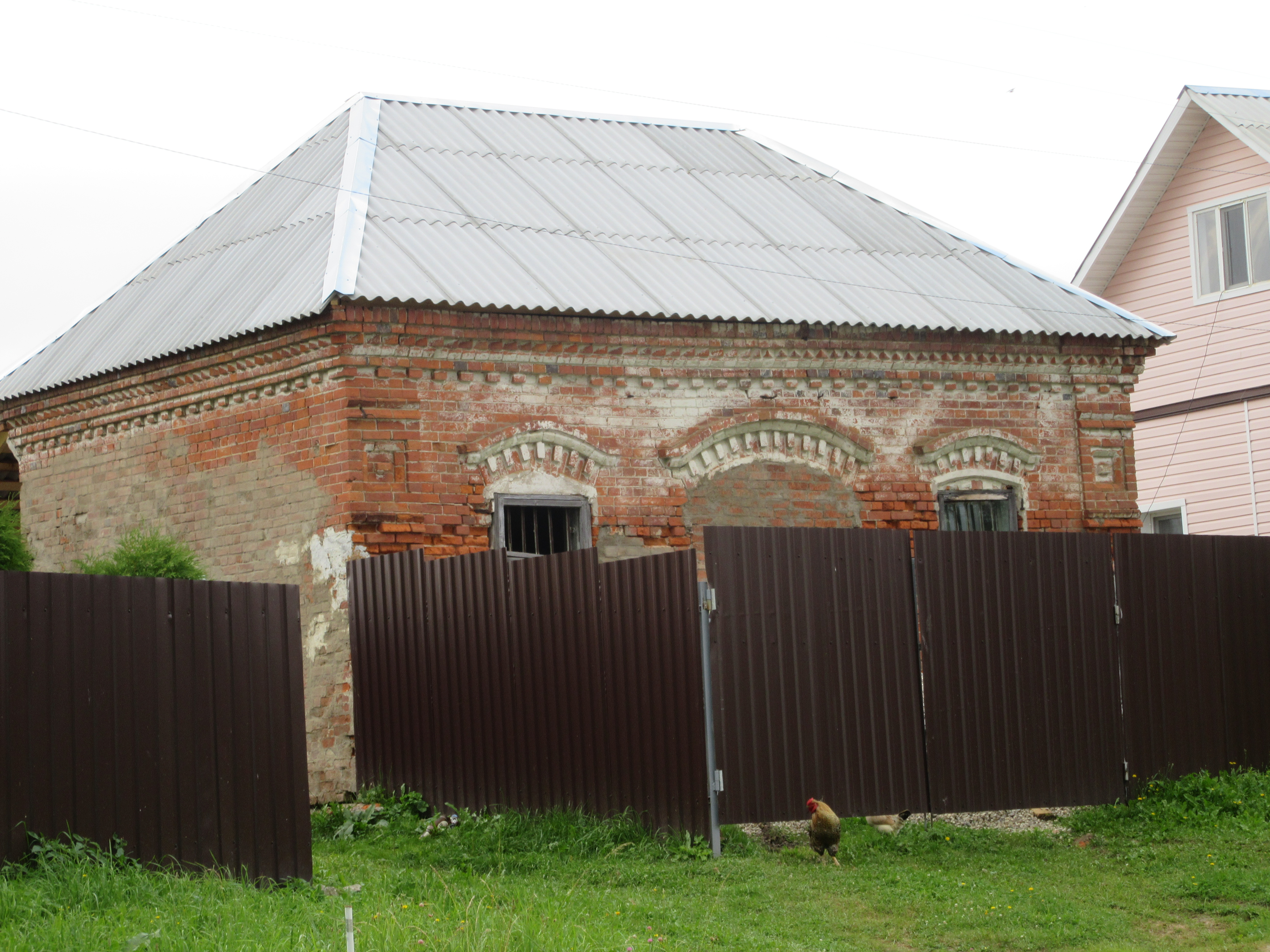 Построено в XIX веке